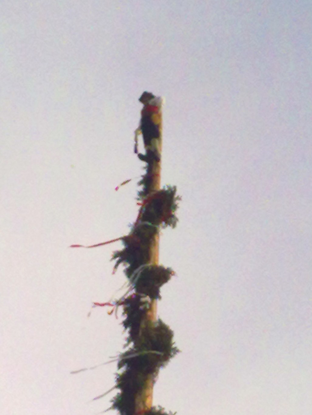 Kirchtagsmichl in Toblach